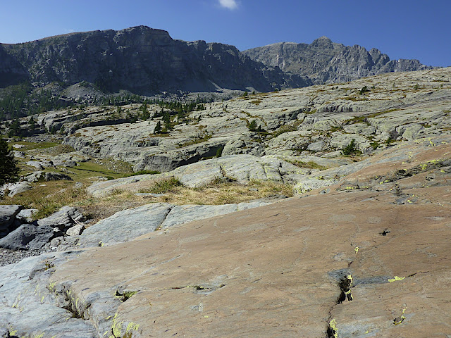 Dalles avec gravures sur le site de Fontanalbe et Mont Bego en arrière plan